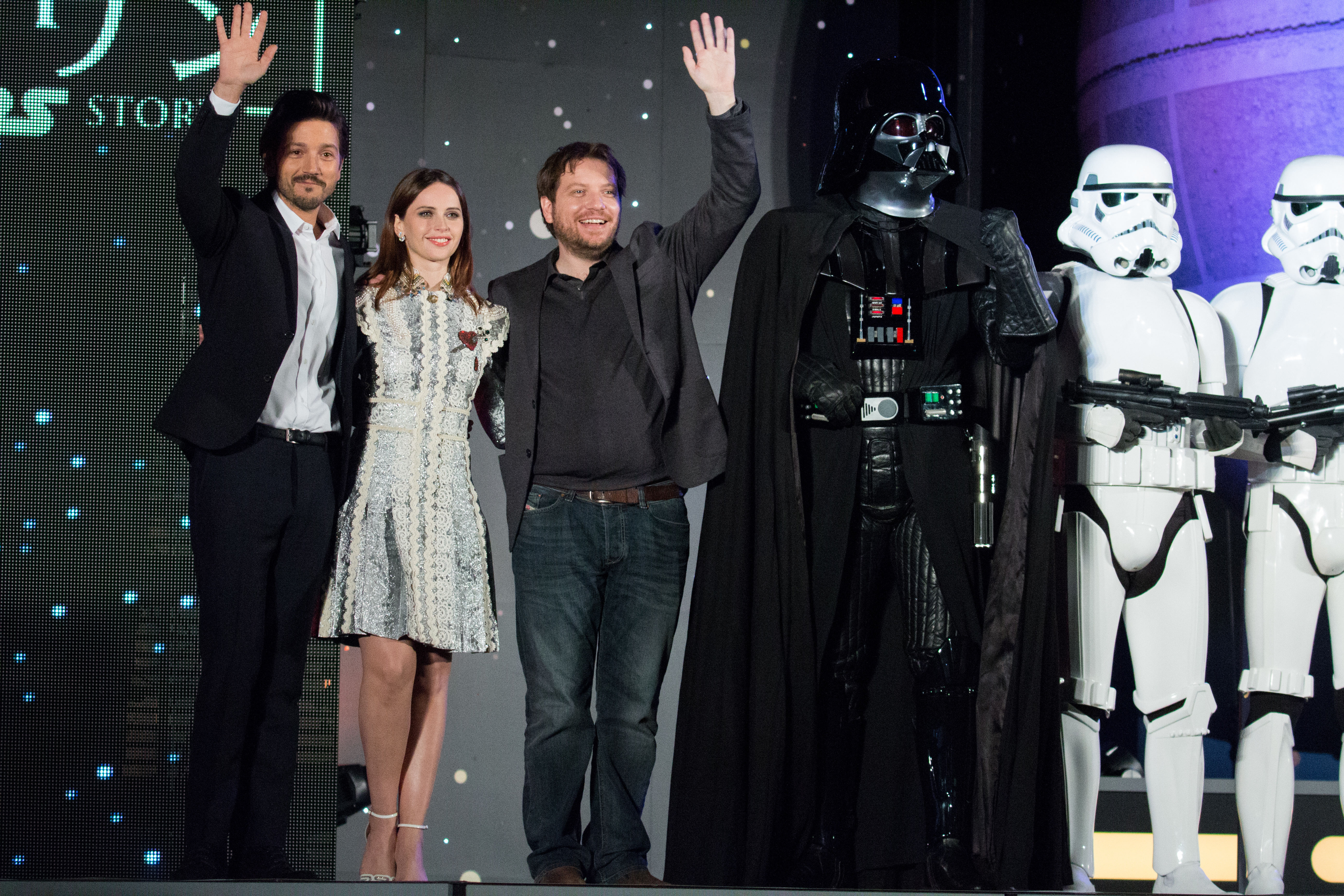 ローグ・ワン/スター・ウォーズ・ストーリー ジャパン・プレミア レッドカーペット ディエゴ・ルナ フェリシティ・ジョーンズ ギャレス・エドワーズ